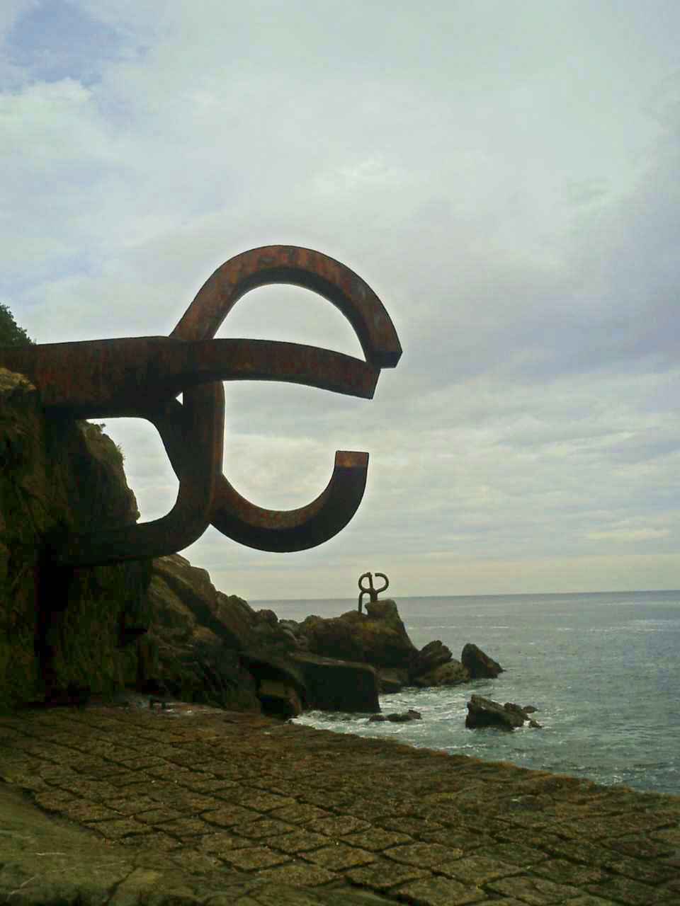 El Peine del Viento en Donostia-San Sebastián.